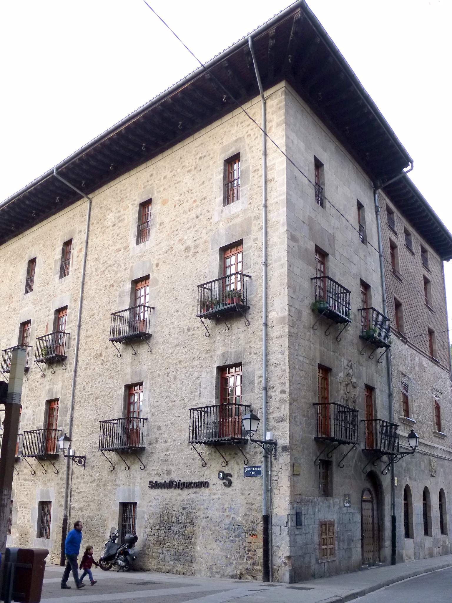 Bergara - Iturritxu Etxea